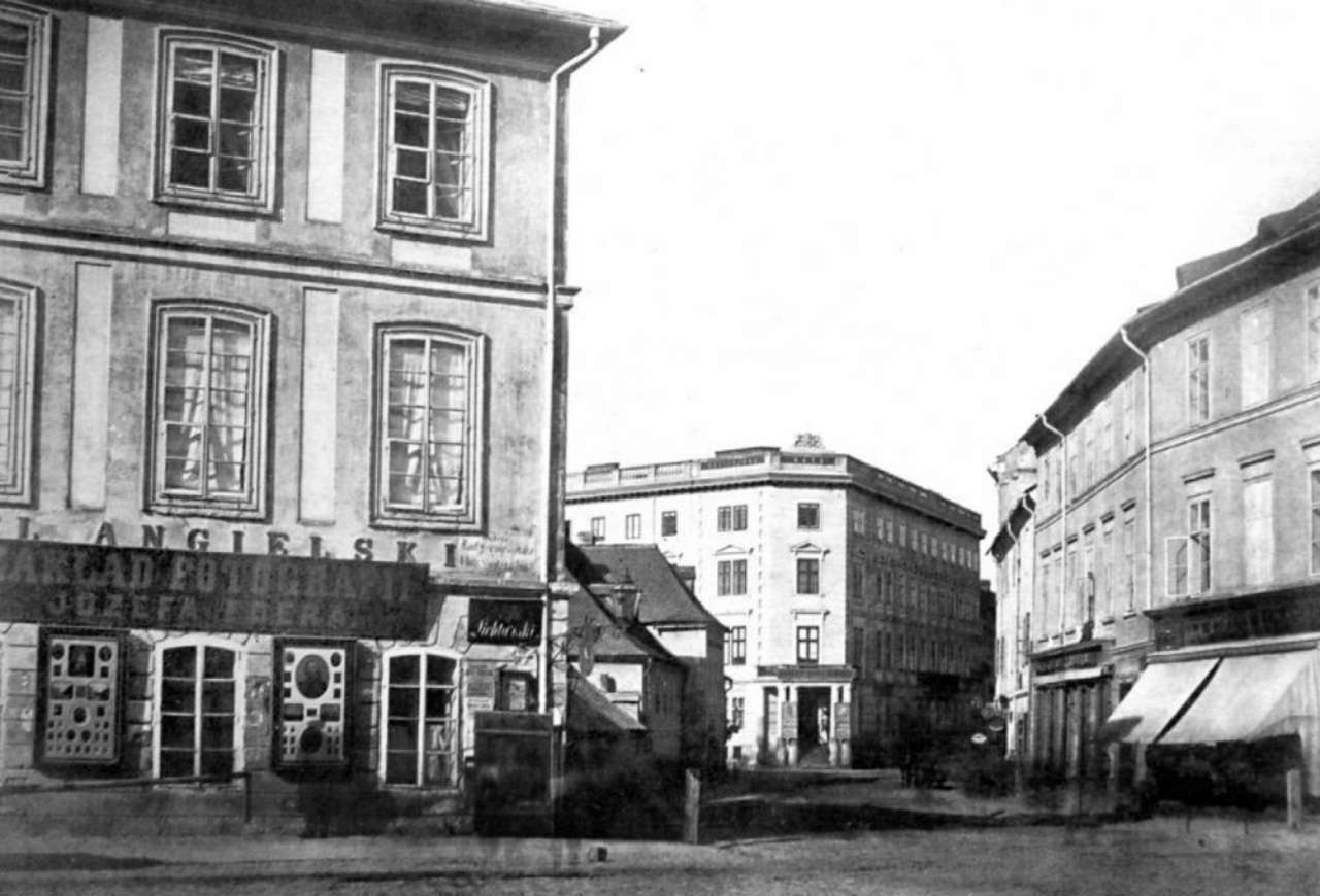 Фото до 1889 року. Будинок знесено.